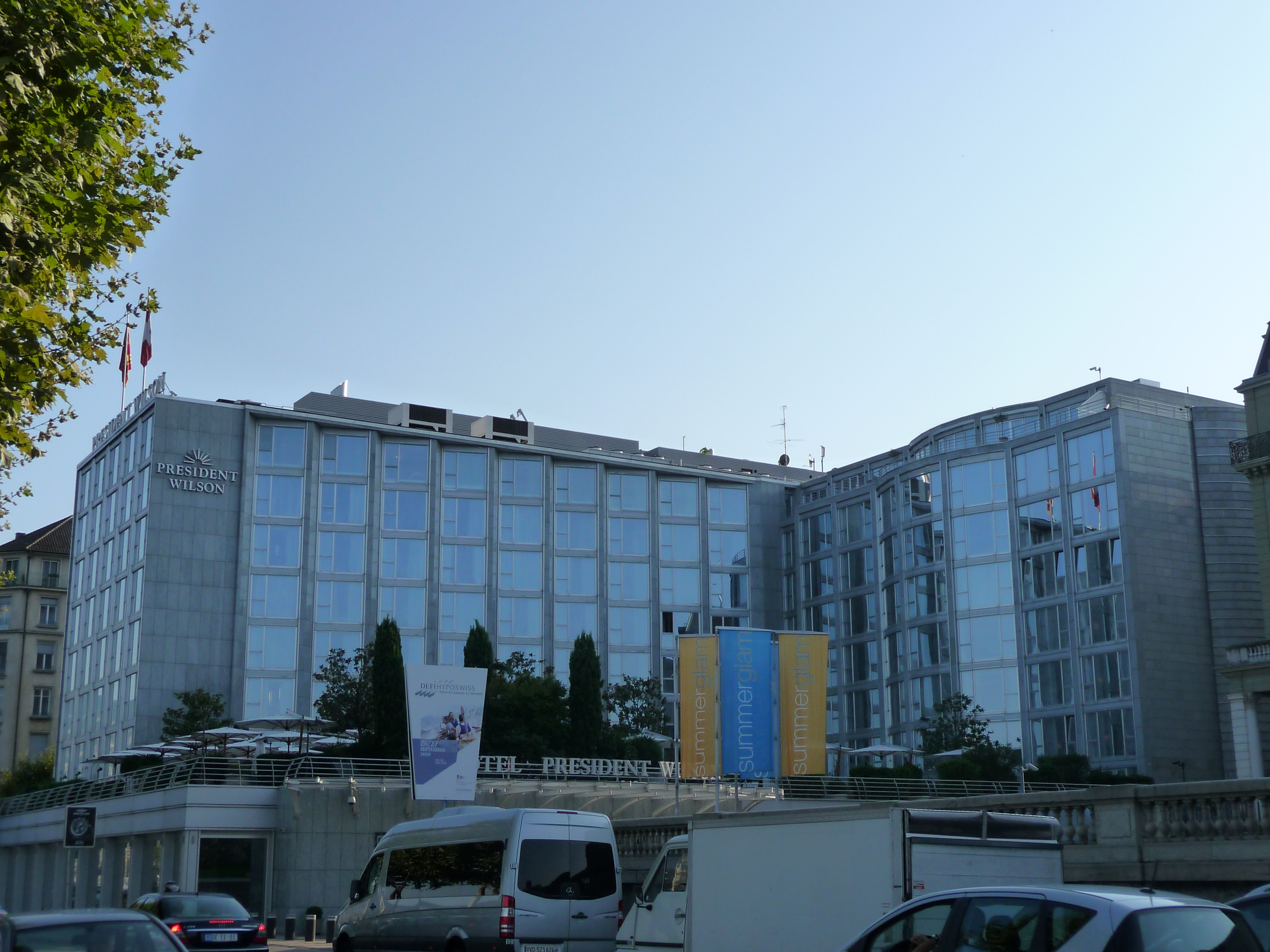 Nouveau part de l'hôtel "Président Wilson" à Genève.